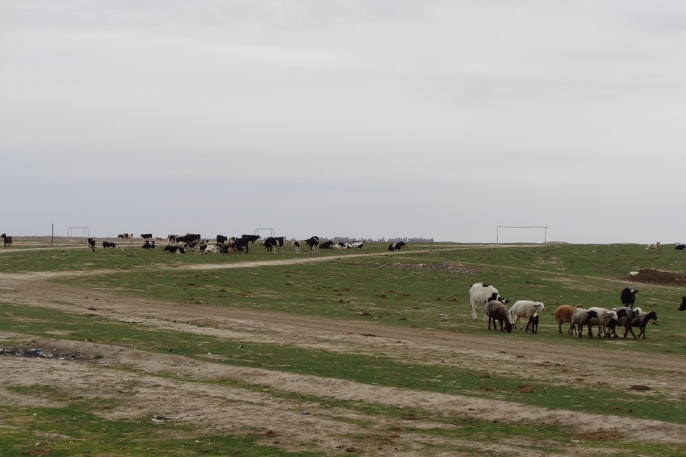 دامپروی در ترکمن صحرا